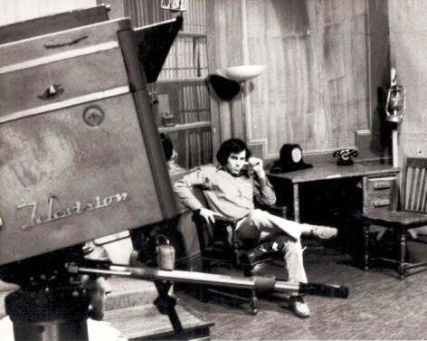 שלח על סט בבית ספר לבימוי טלוויזיה ניו יורק 1971 צילום תומס רודריגז